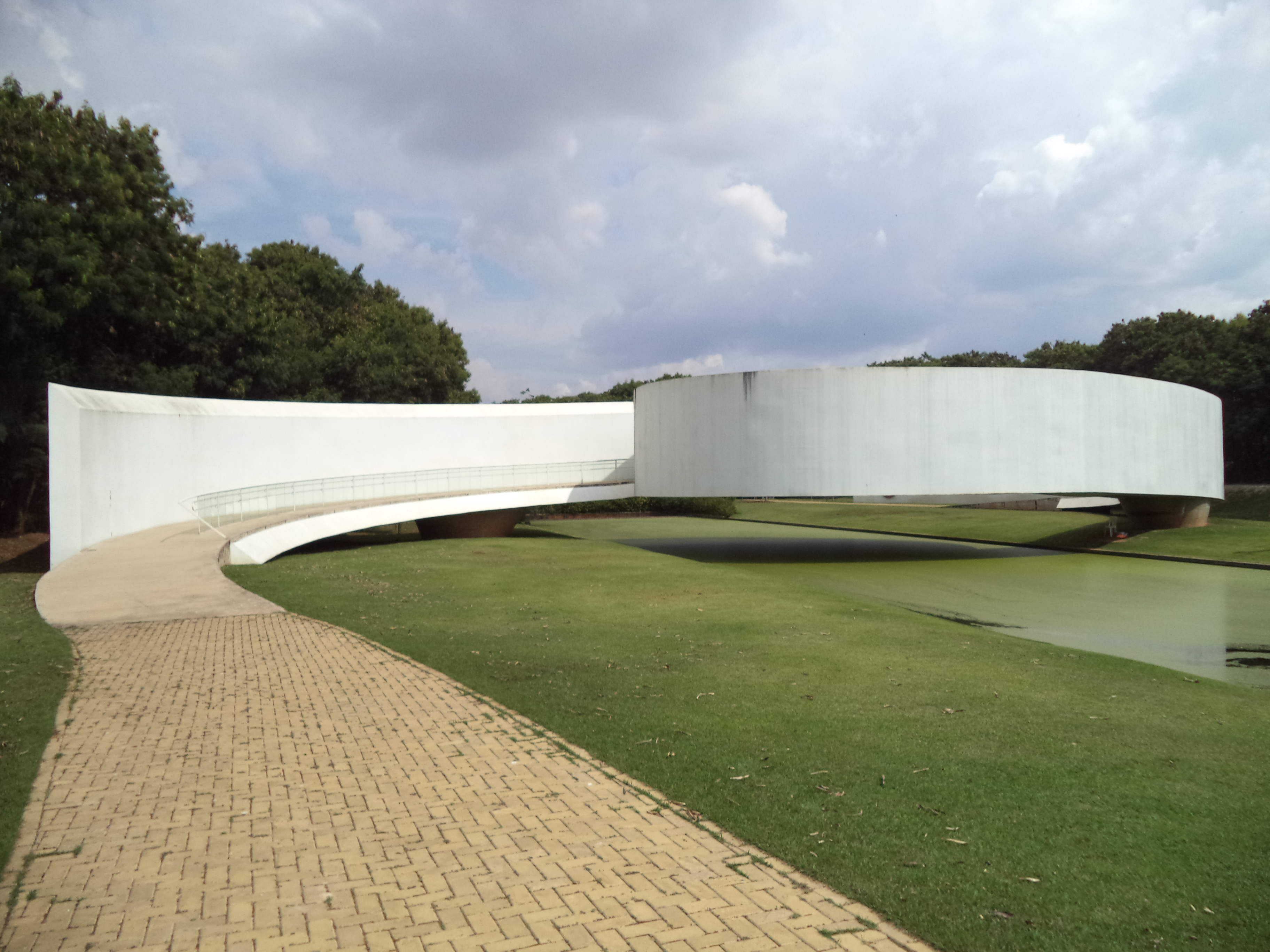 Memorial da Imigração Japonesa no Parque Ecológico Promotor Francisco Lins do Rego, também conhecido como Parque Ecológico da Pampulha